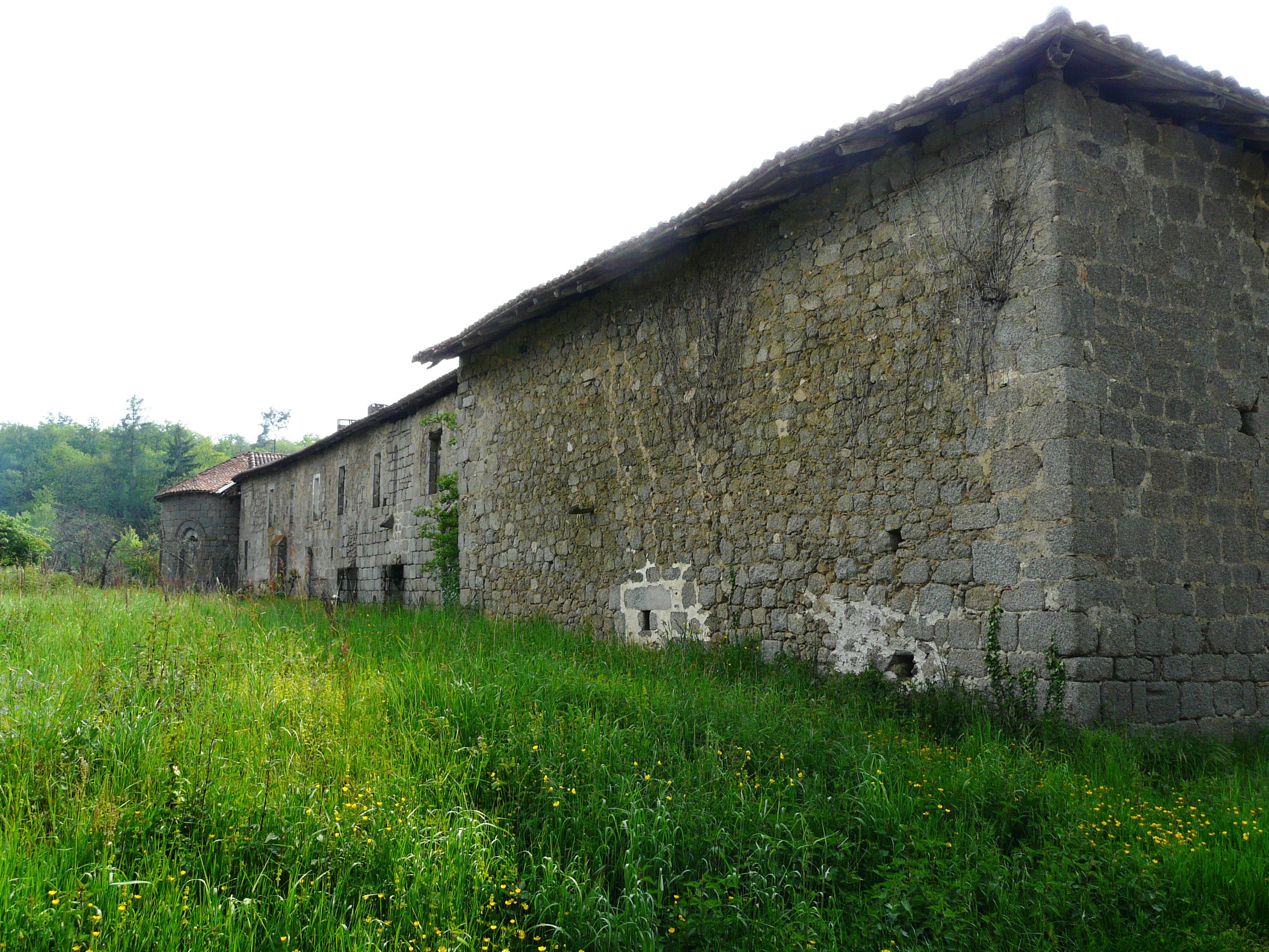 Le côté est de l'ancien prieuré de Badeix, Saint-Estèphe, Dordogne, France.